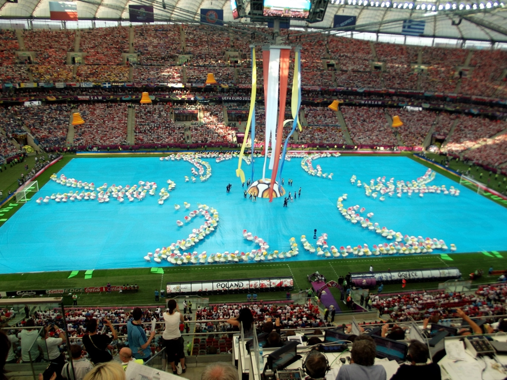 Zdjęcie zrobione w pierwszym dniu UEFA Euro 2012 w Warszawie, dniu otwarcia turnieju i meczu Polska-Grecja.